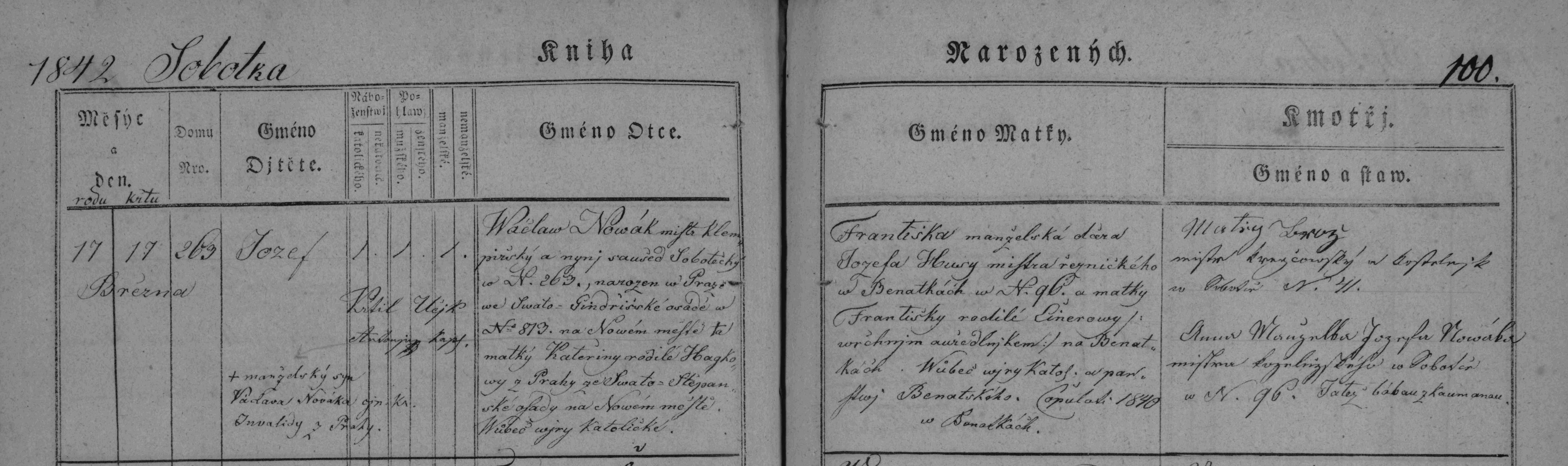 matrika N 1837-1842 města Sobotky, záznam o narození Josefa Vincence Nováka v roce 1842